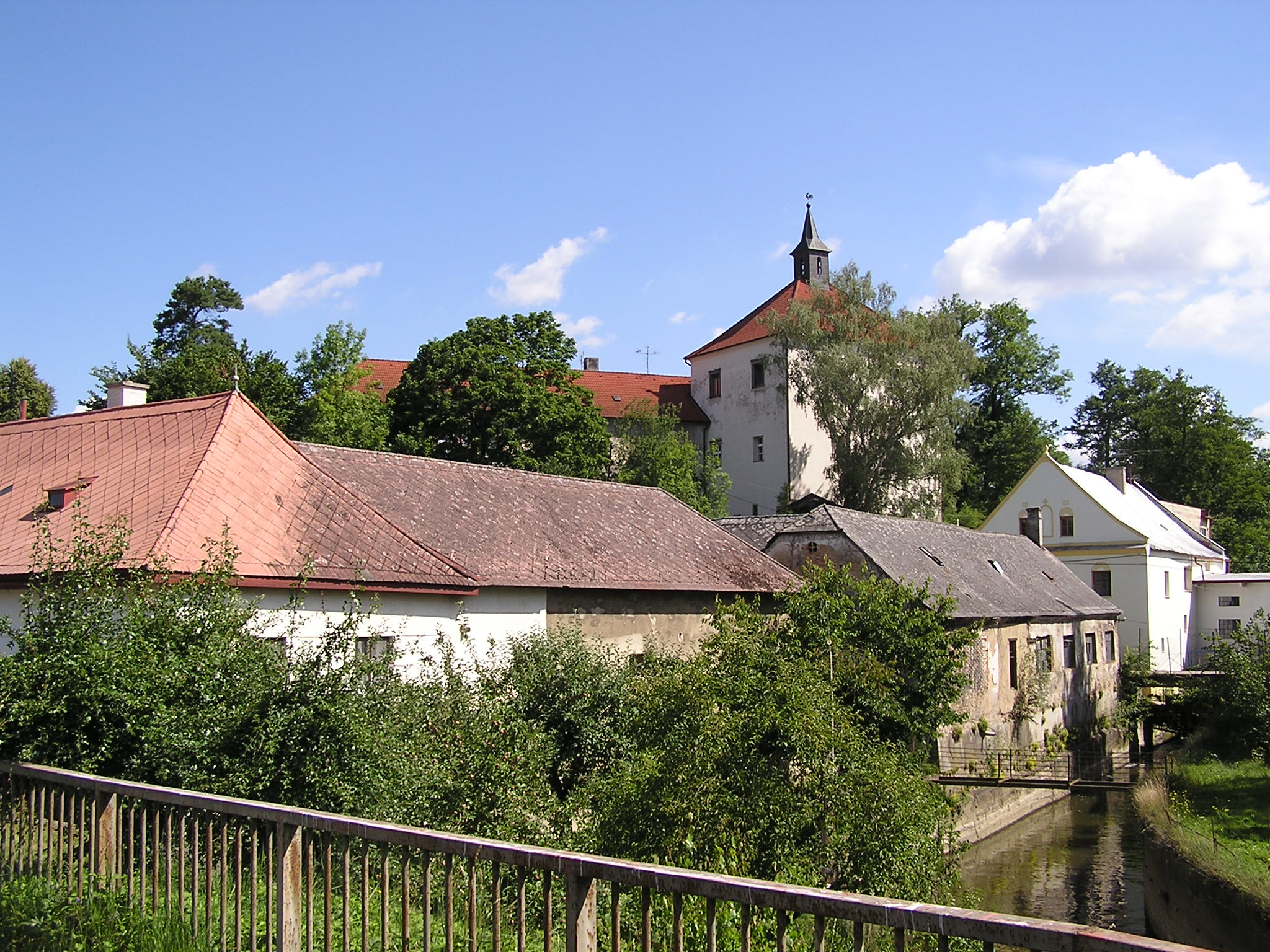 Tvrz v Okrouhlicích